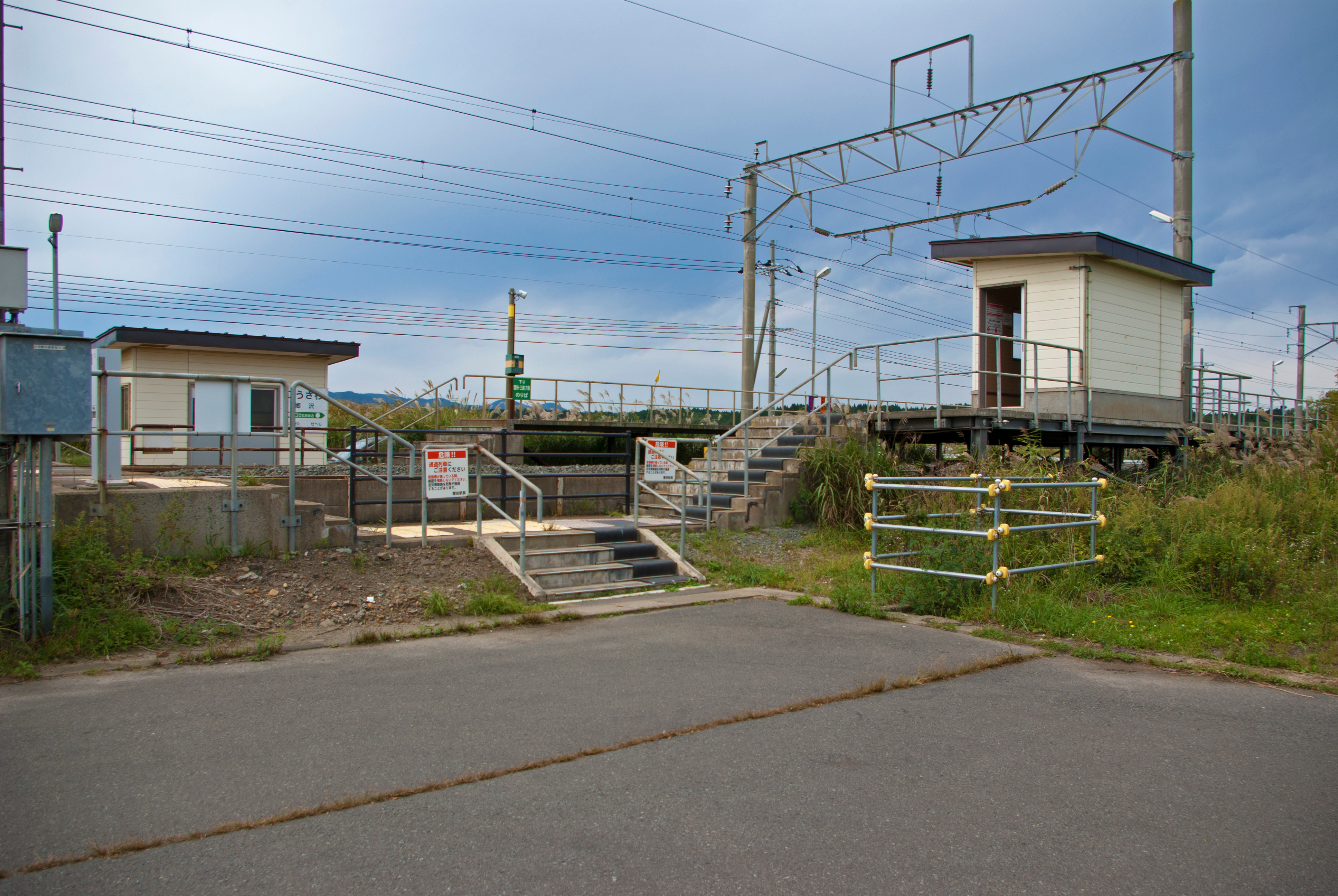 東日本旅客鉄道津軽線郷沢駅